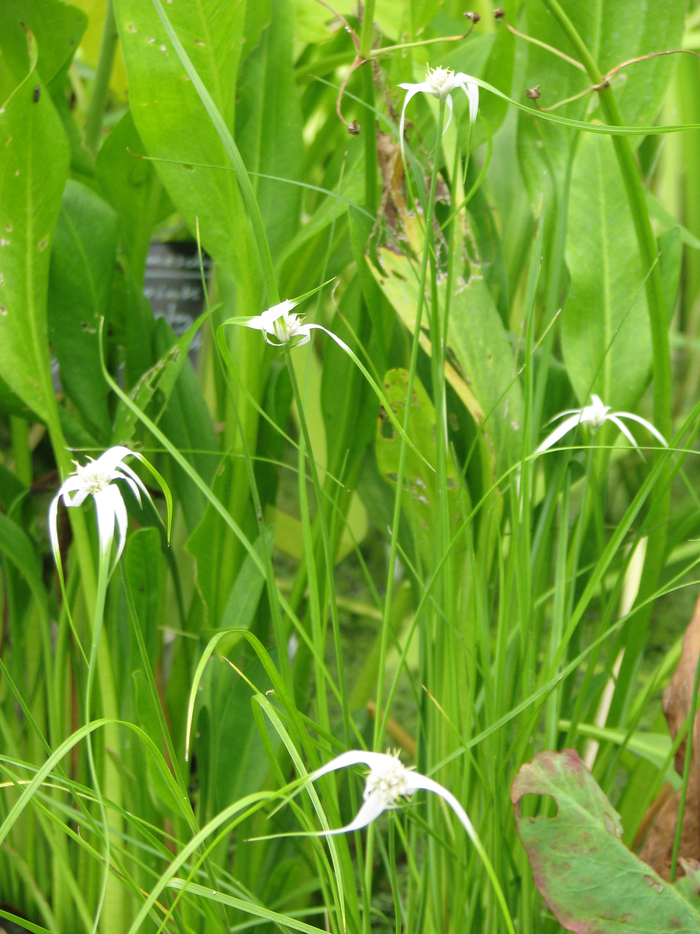 Dichromena colorata